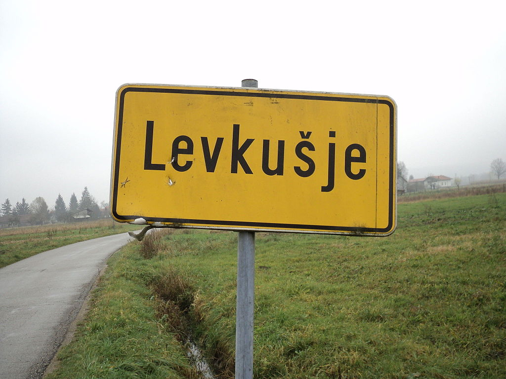 Tabla na ulasku u Levkušje